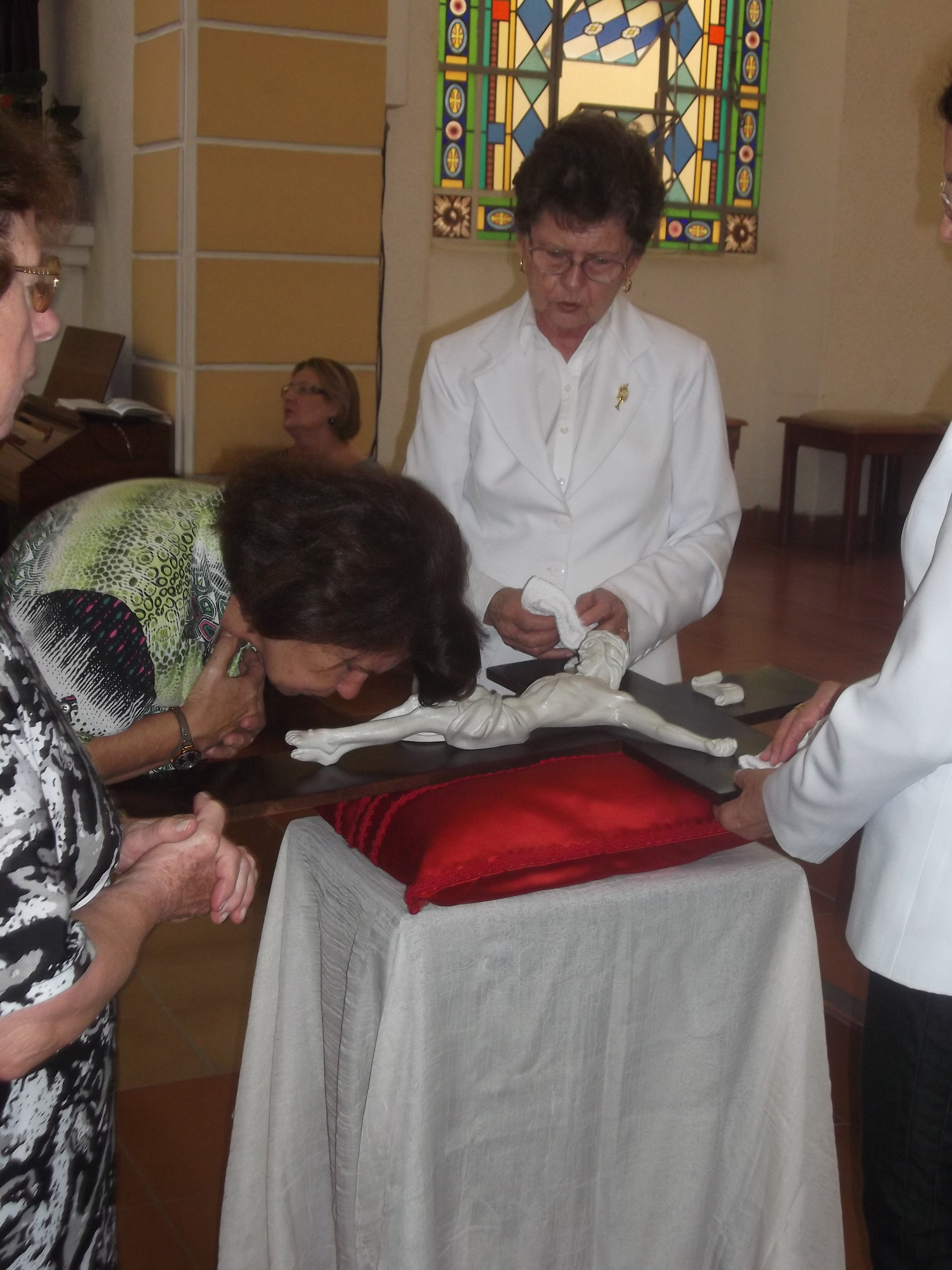 Adoração da Cruz, Sextafeira Santa